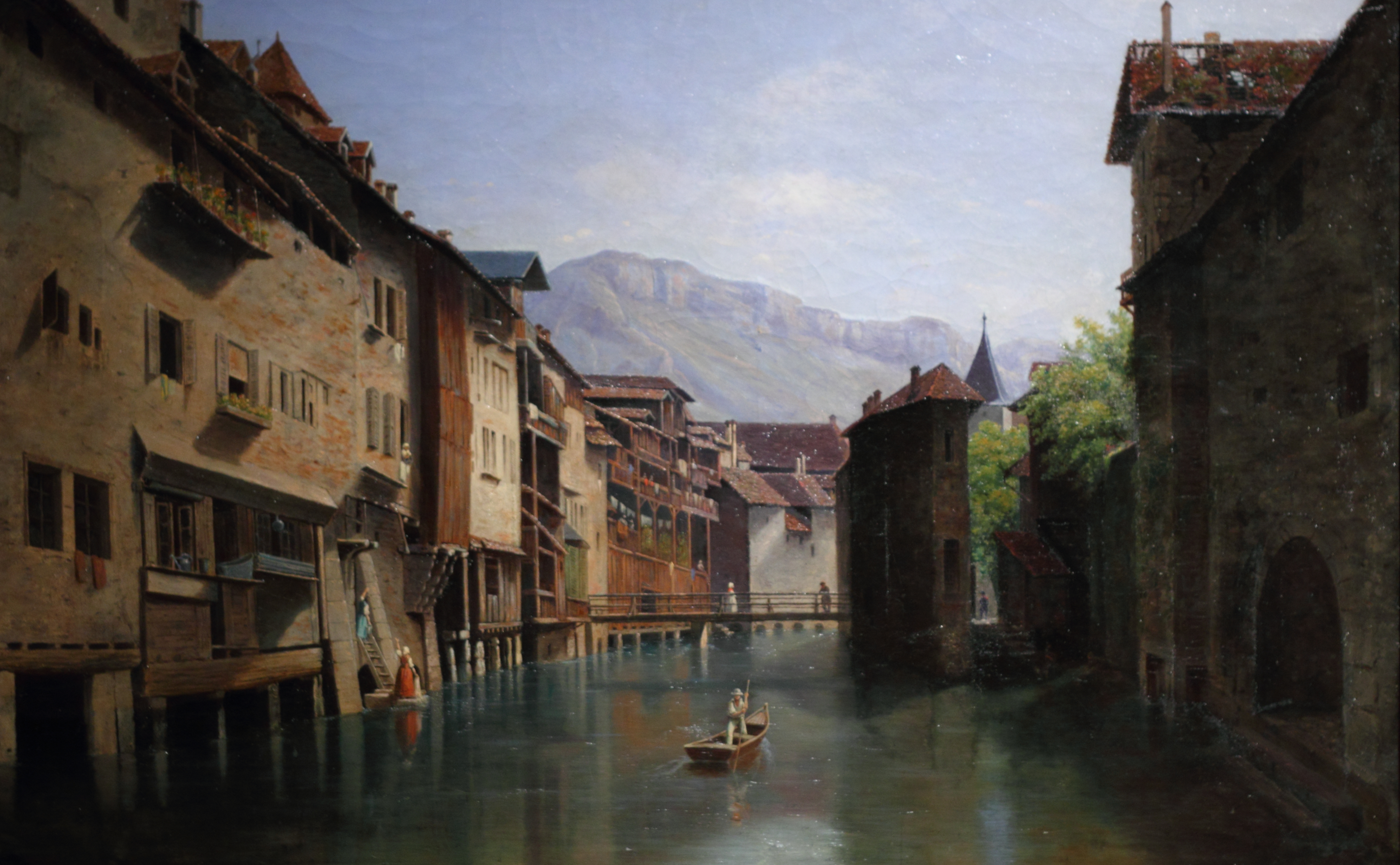 Peinture de la seconde moitié du XIXème siècle